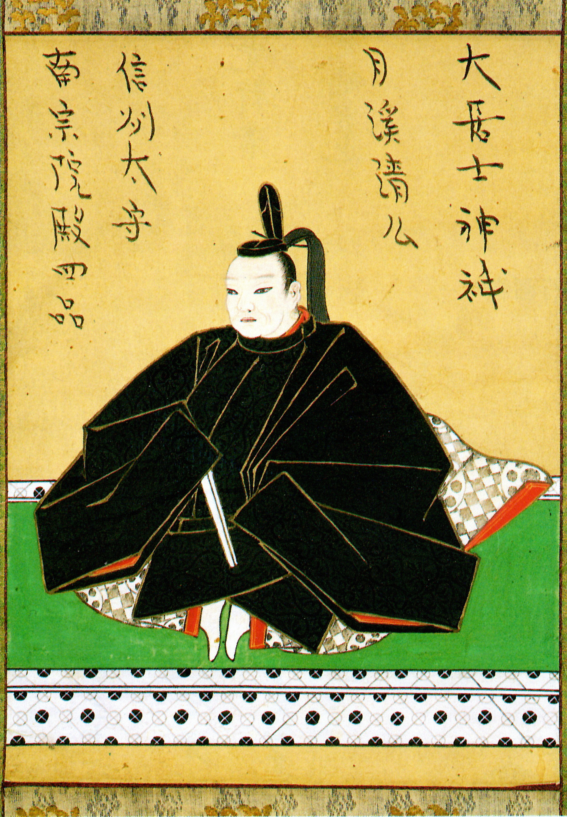 南部利直の肖像。